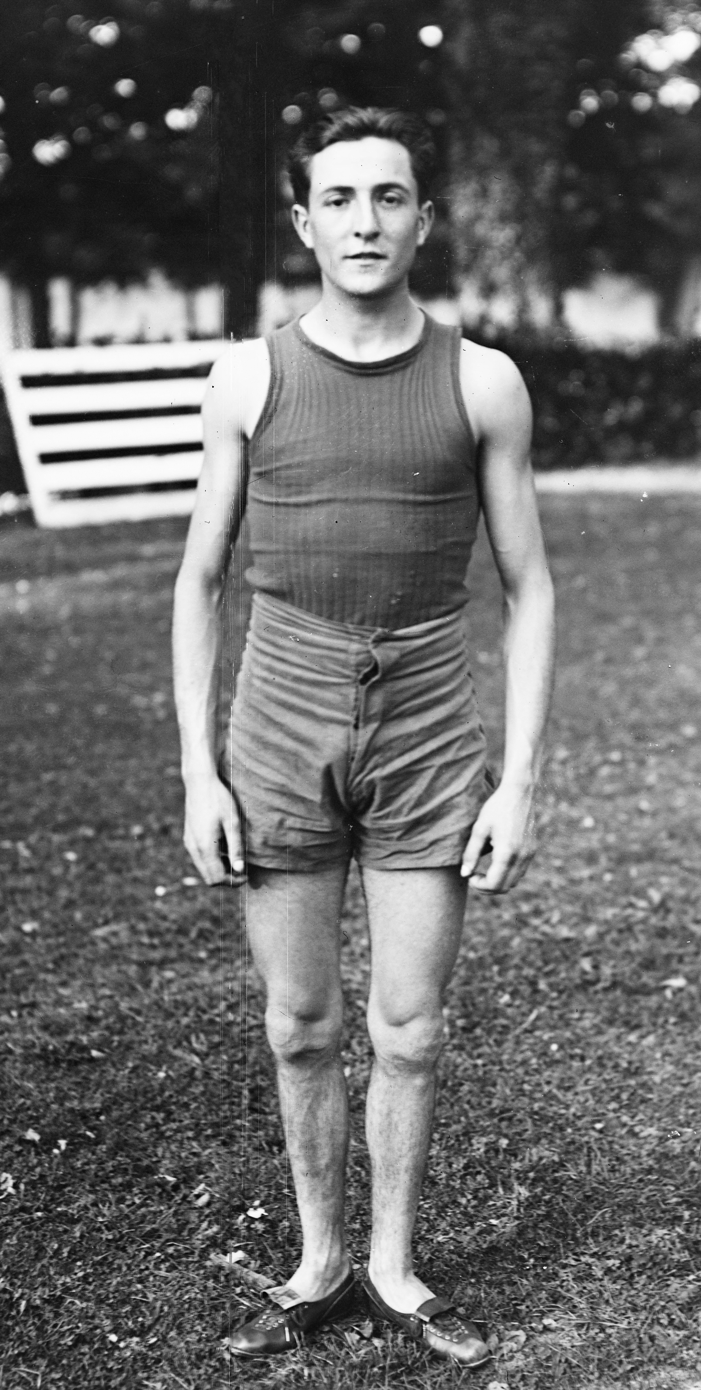 Pierre Lewden, lauréat du saut en hauteur lors de la rencontre annuelle d'athlétisme entre le Stade Français et les Polytechnic Harriers de Londres, au stade de la Faisanderie à Saint-Cloud, 12-9-1920.